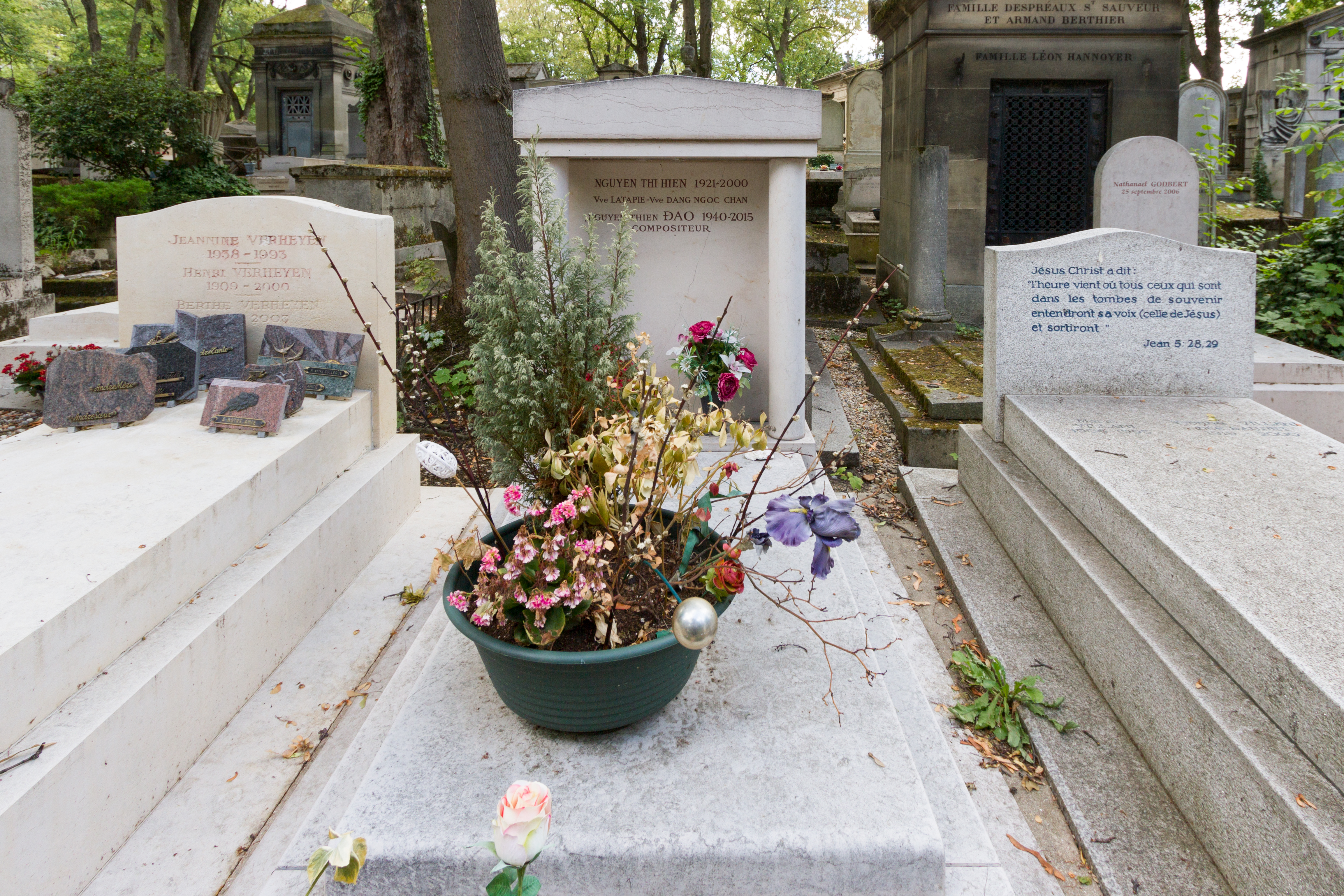 Sépulture de Nguyen Thien Dao (1940-2015), compositeur français d'origine vietnamienne qui travaille dans la musique classique contemporaine.